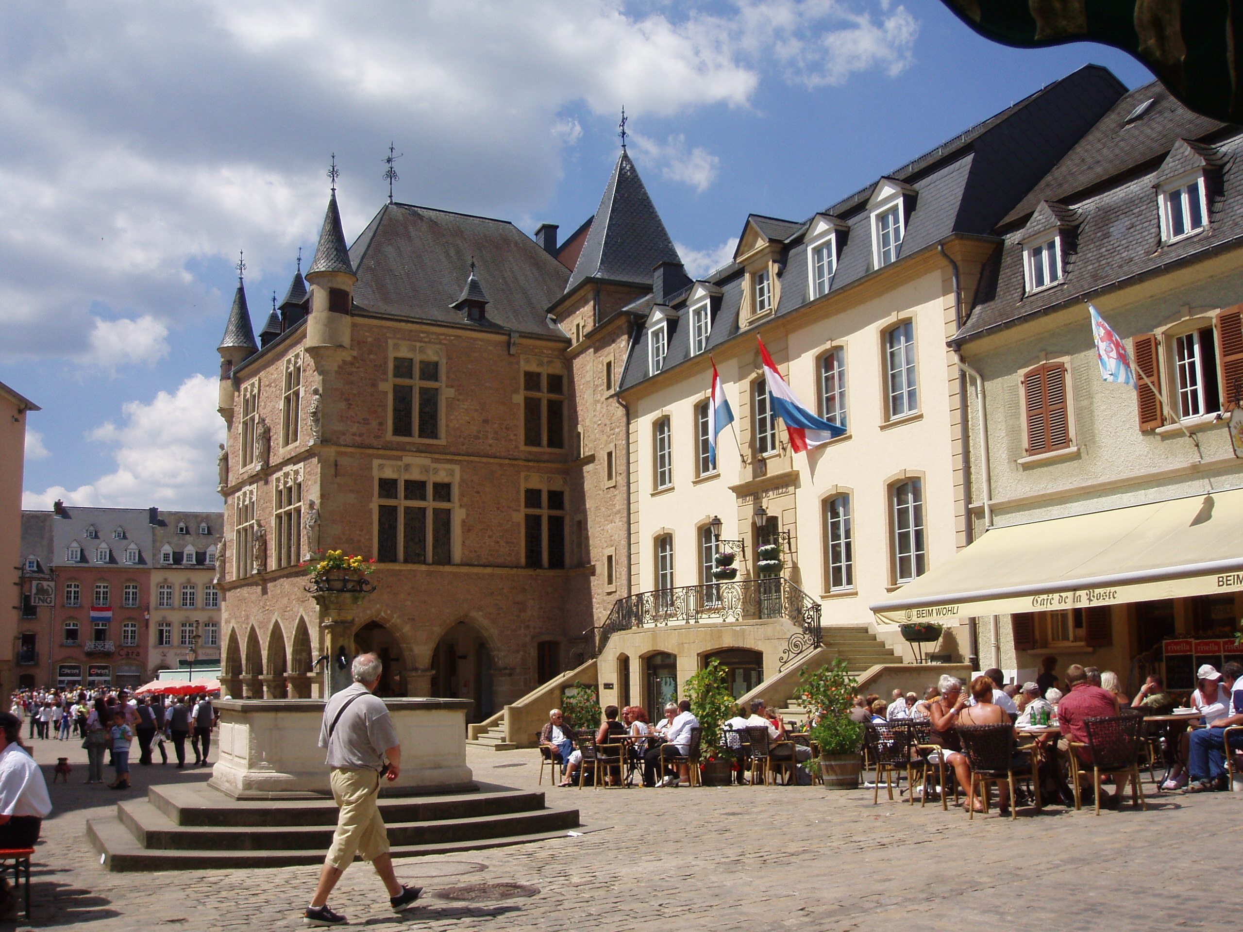 Echternach